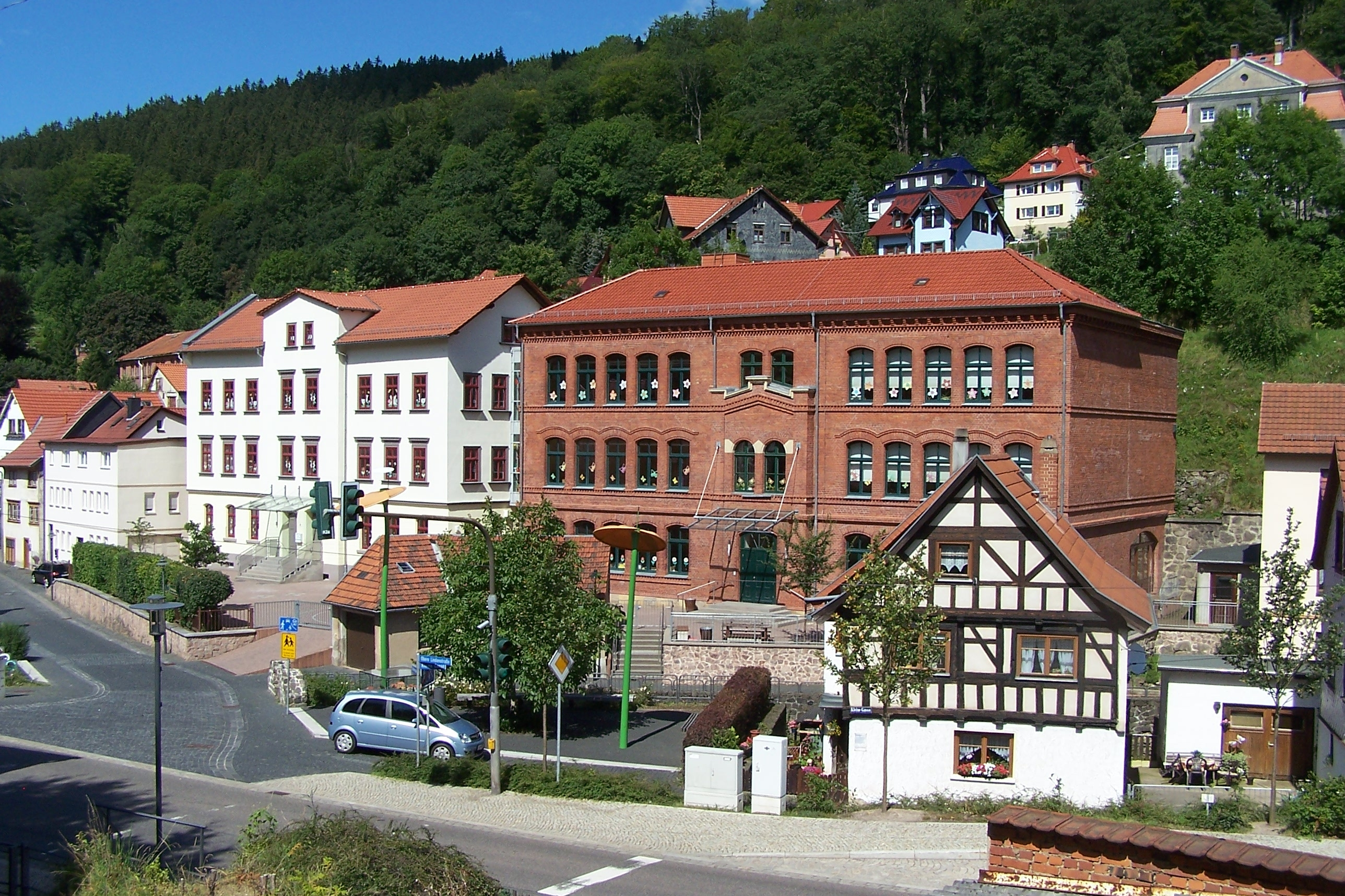 Ansichten der Breitenbergschule in Ruhla, K�hlergasse.